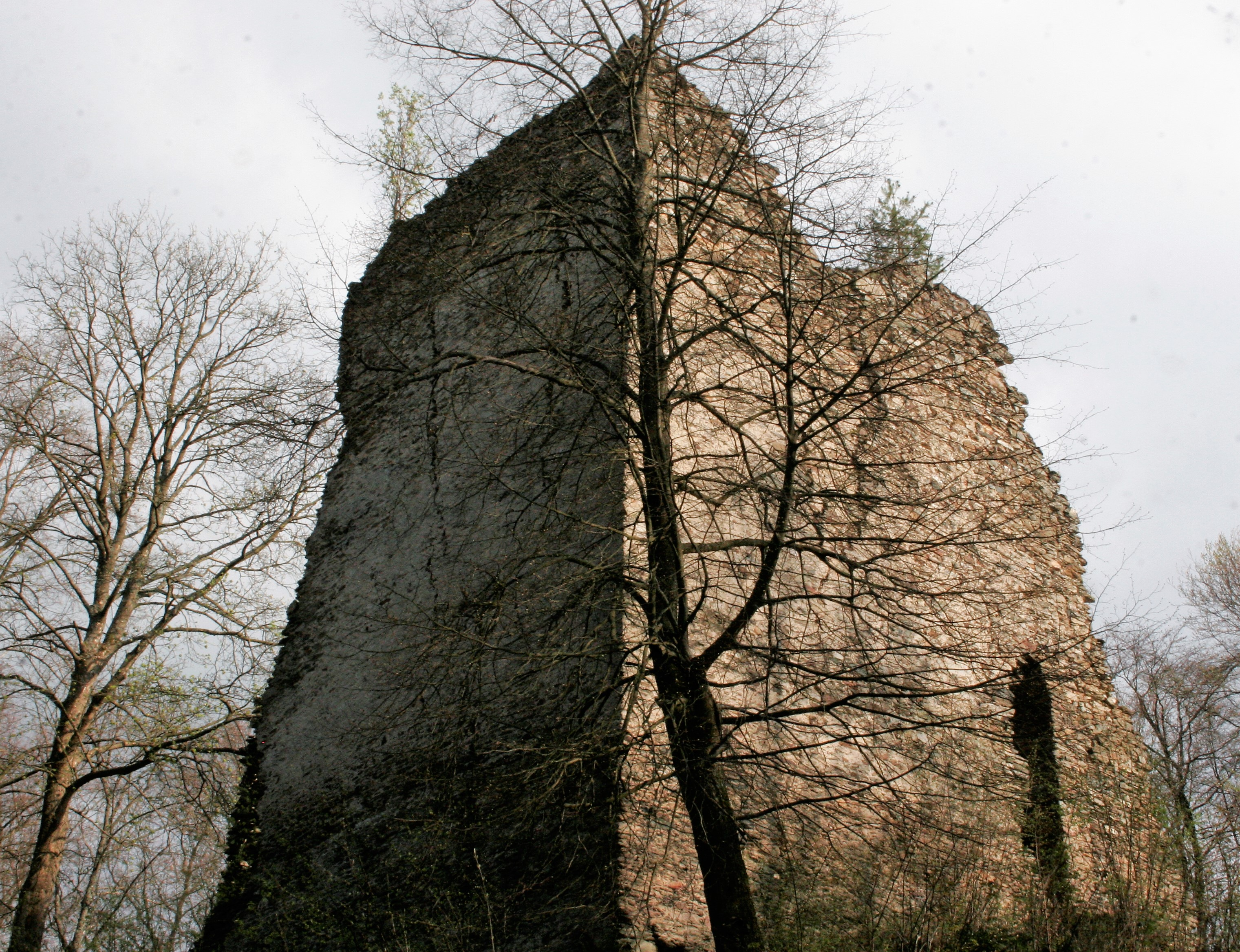 Hrad Pajrek, okres Klatovy, Česká republika.